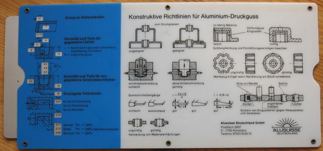 Datenschieber mit "Konstruktuiven Richtlinien für den Aluminium-Sand- und Kokillen und Druckguss"; keine Jahresangabe; Hersteller: Alusuissse